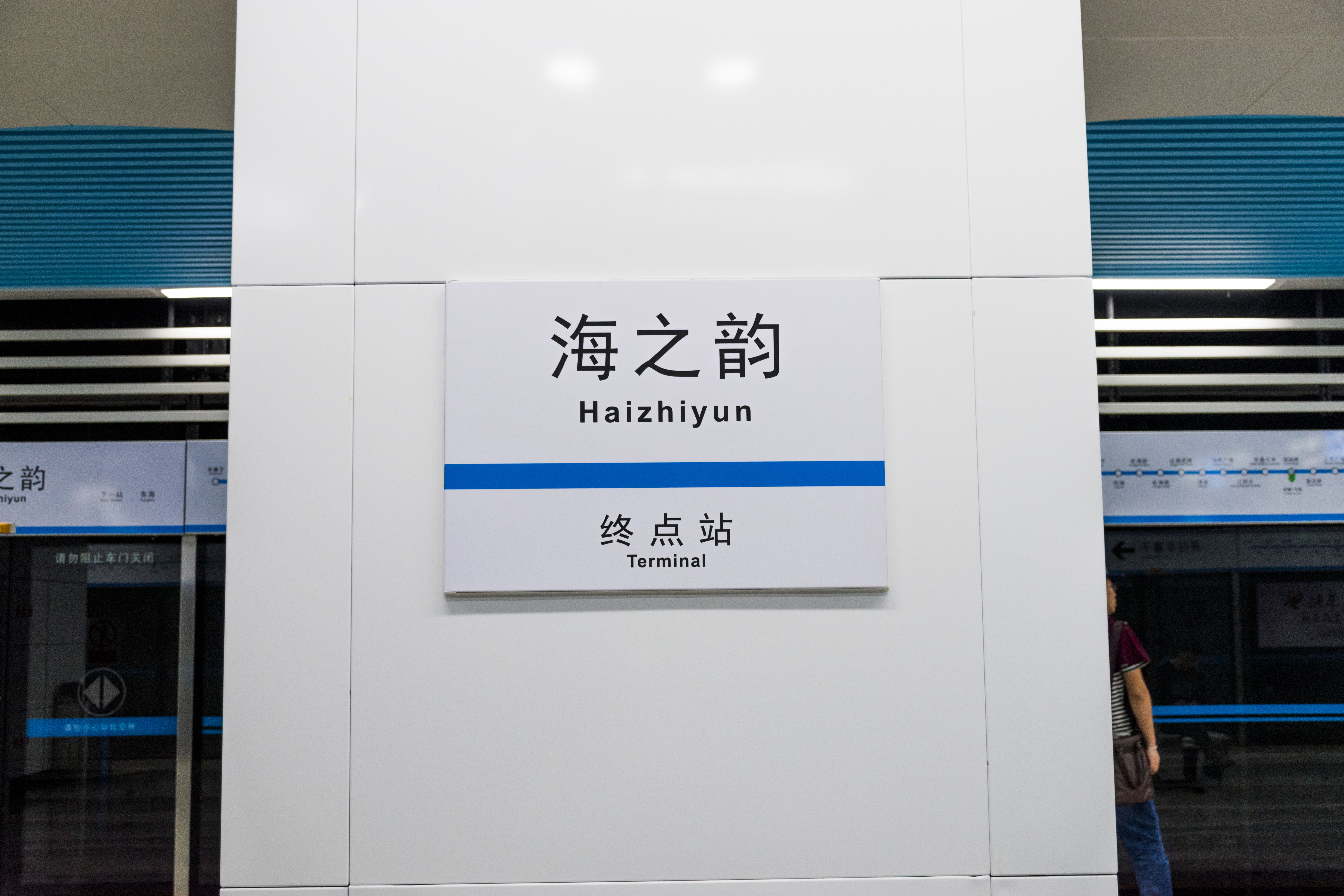 海之韵站